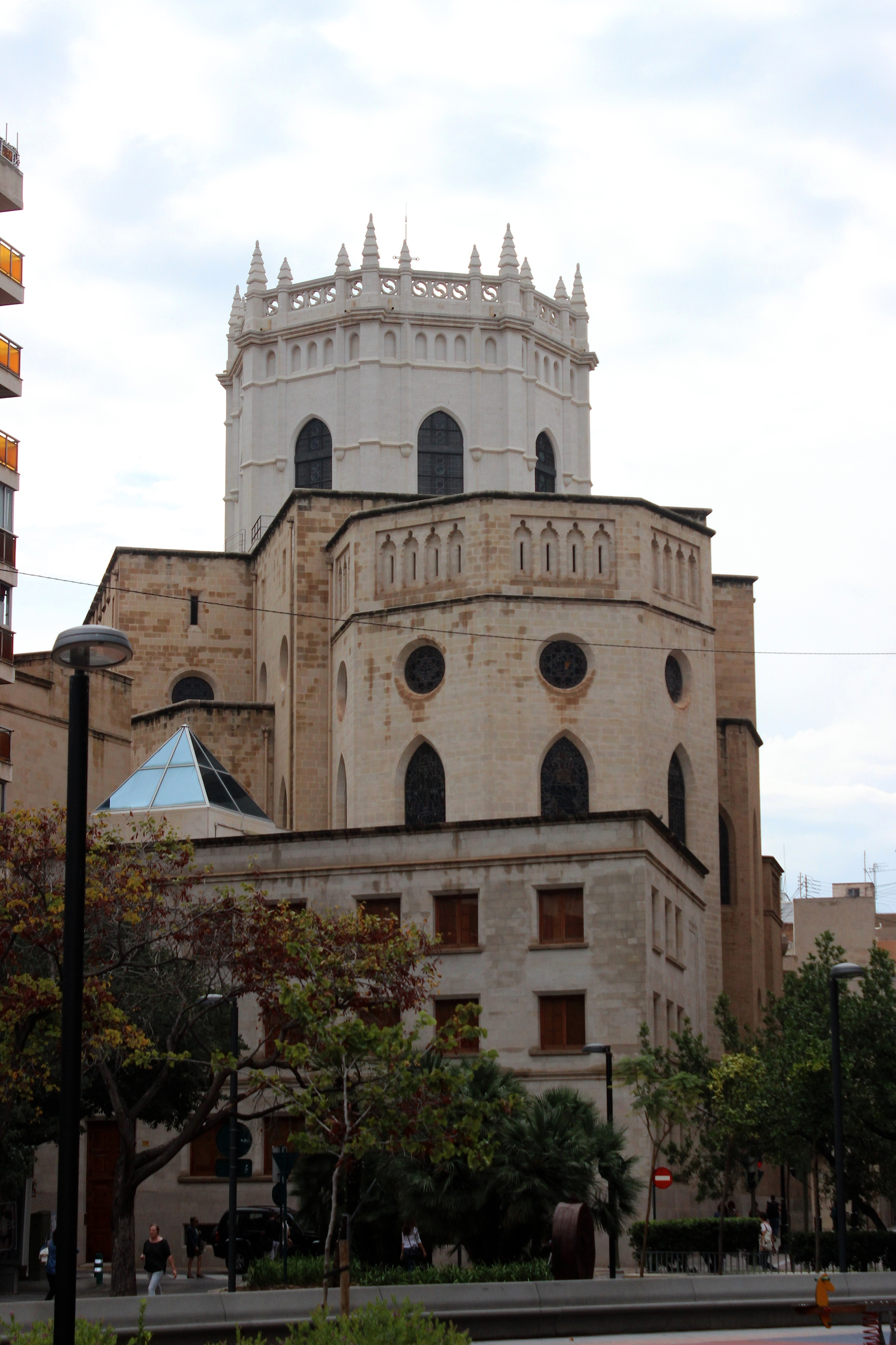 Concatedral de Castellón.